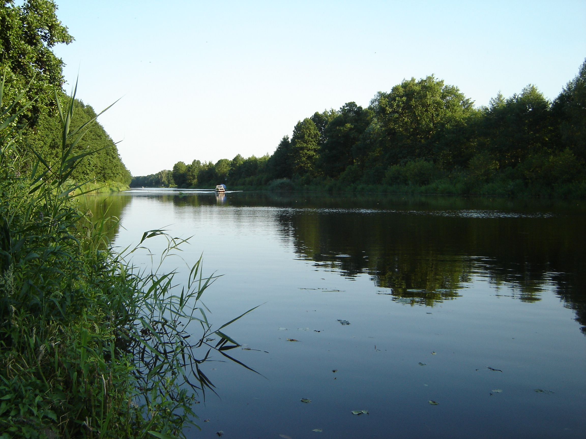 Der Oder-Spree-Kanal bei Berkenbrück. Object location52° 20′ 22.49″ N, 14° 09′ 42.73″ E